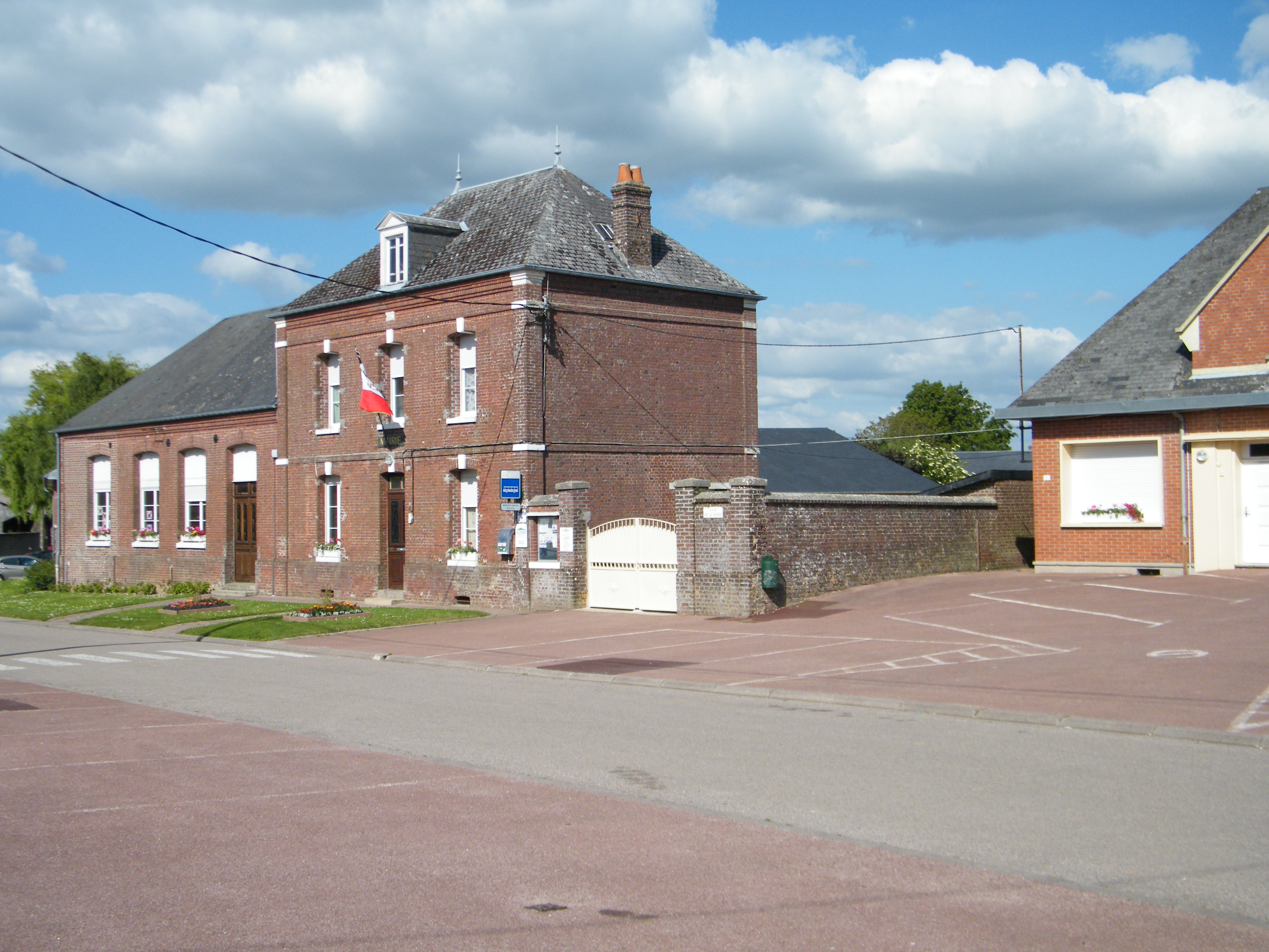 Mairie-école.